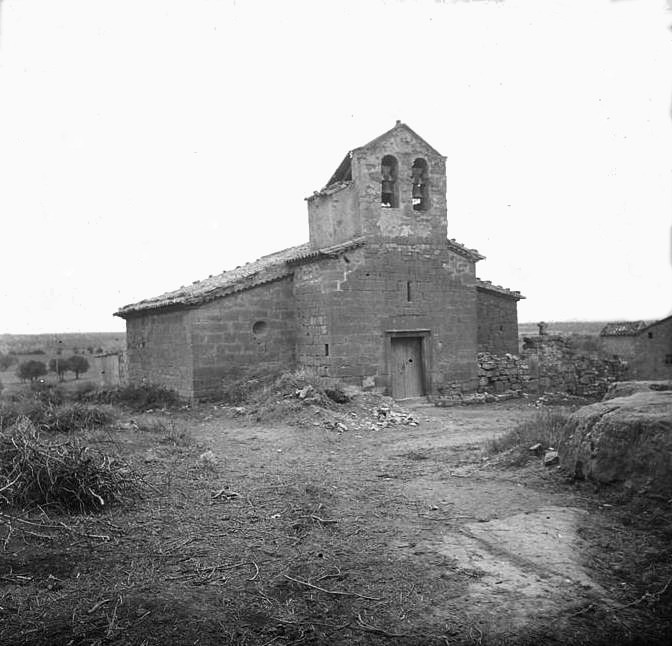 Capella de Montcortès de Segarra. Josep Salvany i Blanch (1918)